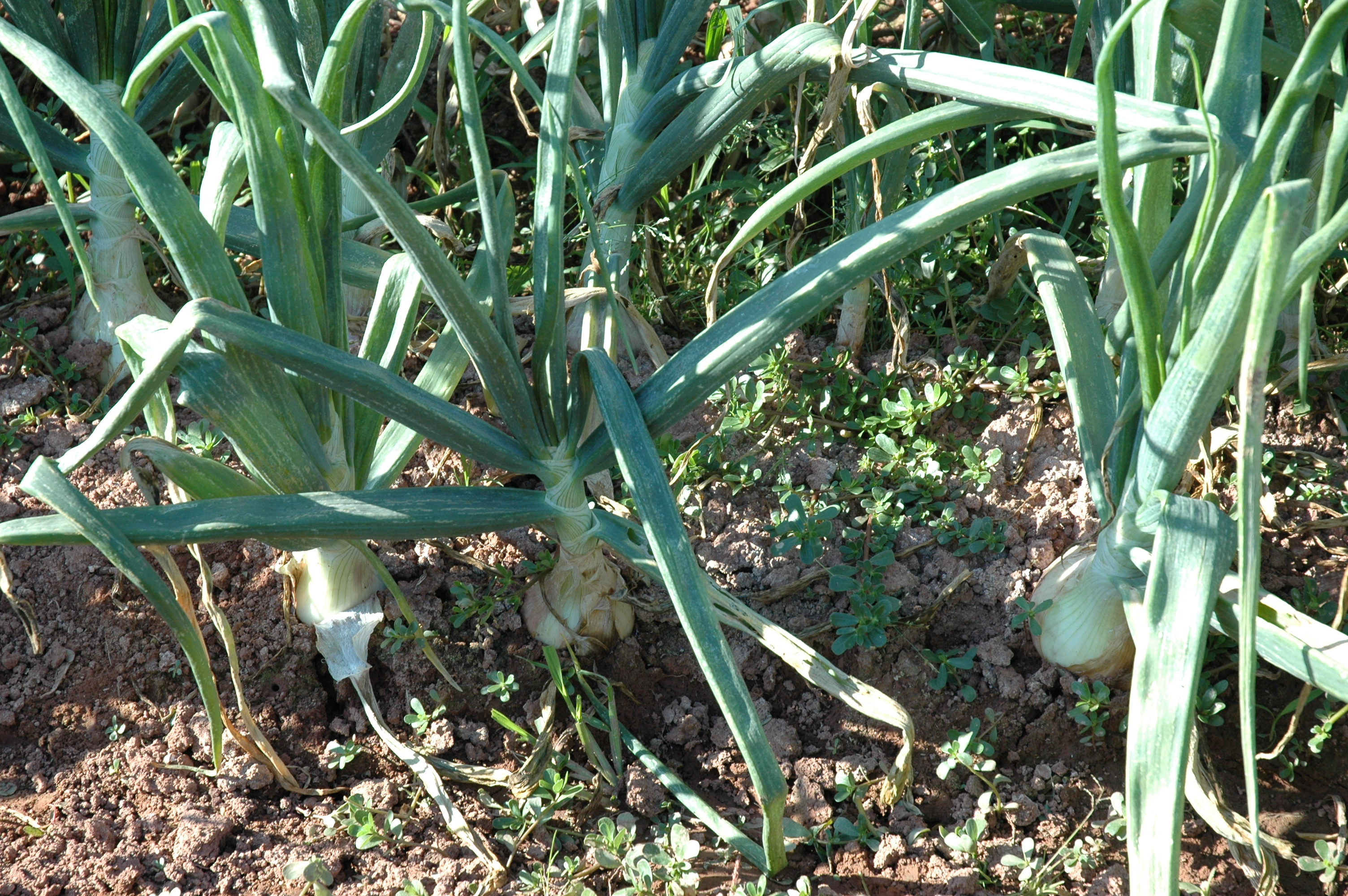 Cebes